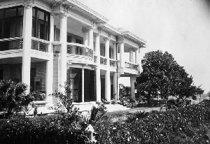 伯捷别墅旧照